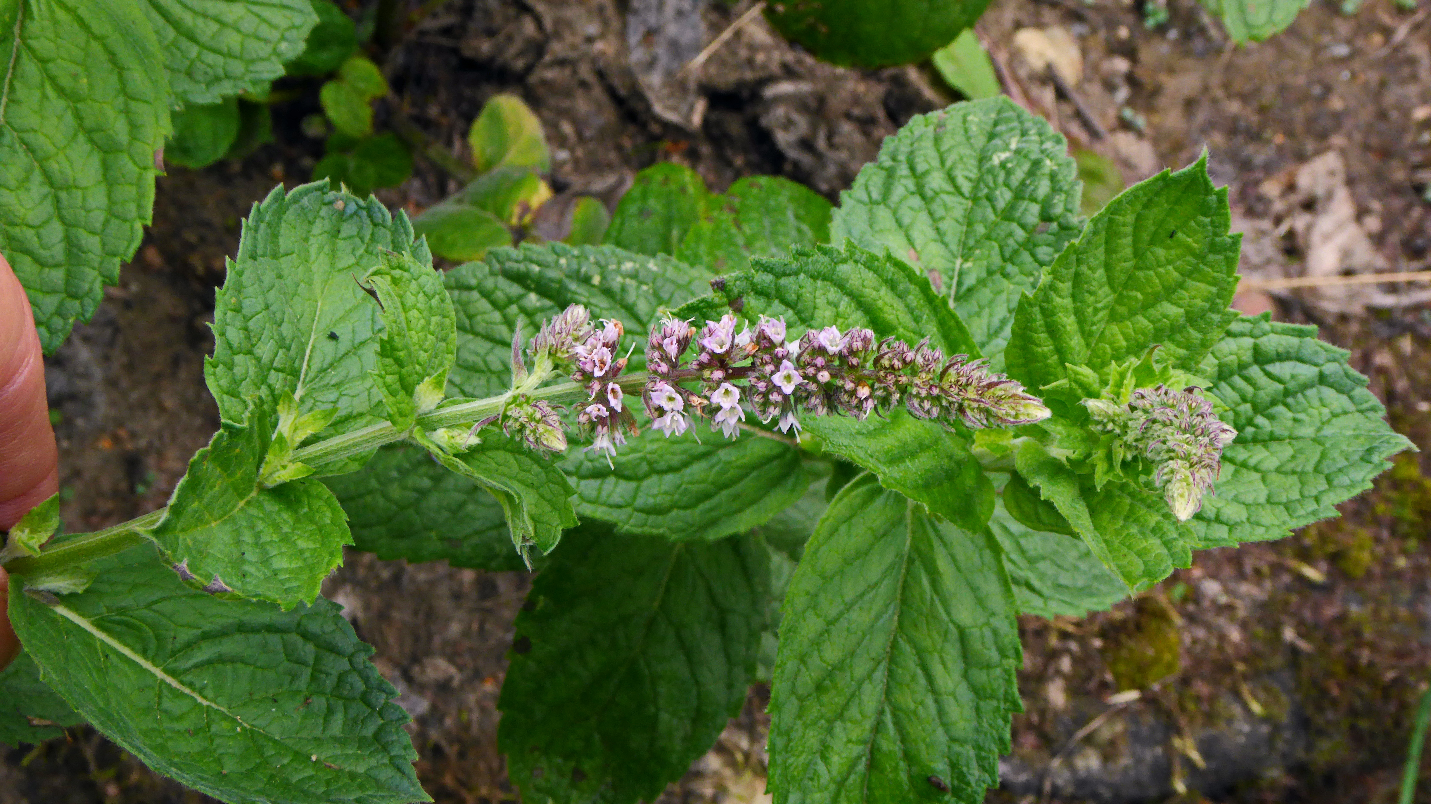 Blütenstand der Rossminze mit grünen Laubblättern im Kräutergarten des Klosters „Zum Heiligen Kreuz“